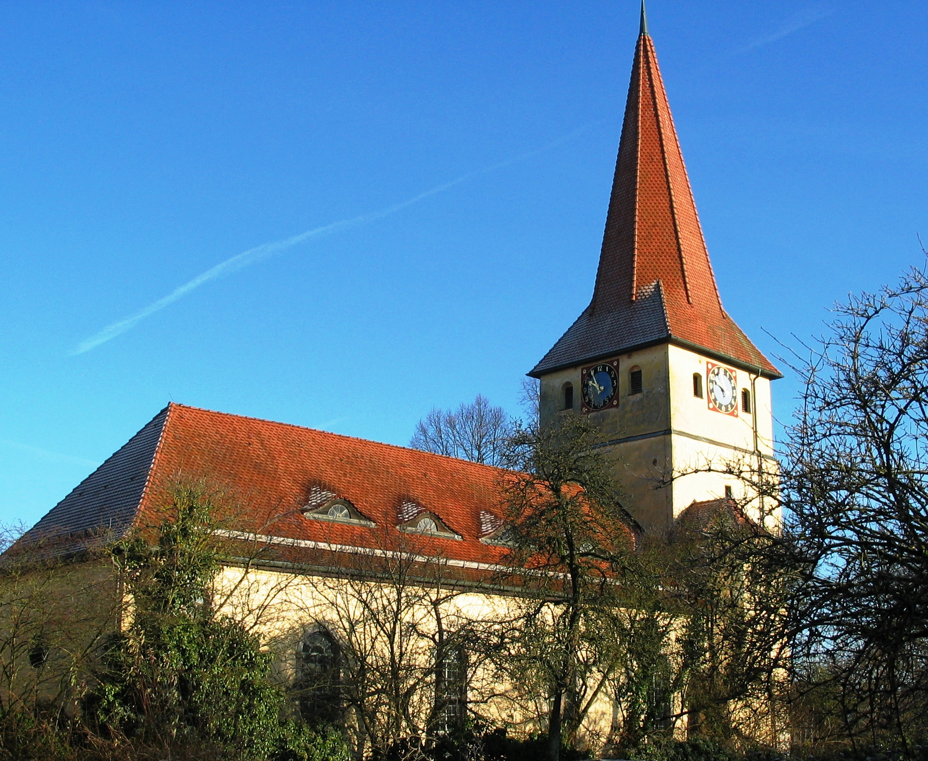 Marienkirche Oberferrieden